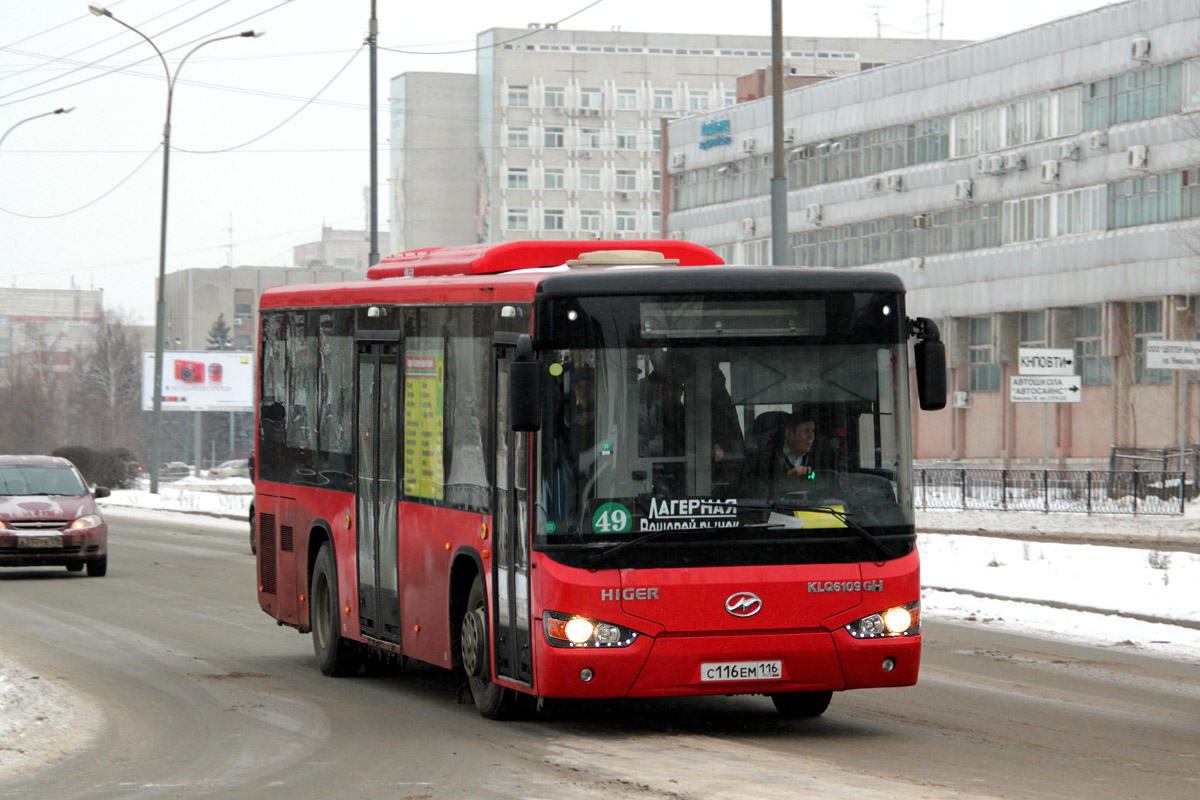 Higer 6109GH